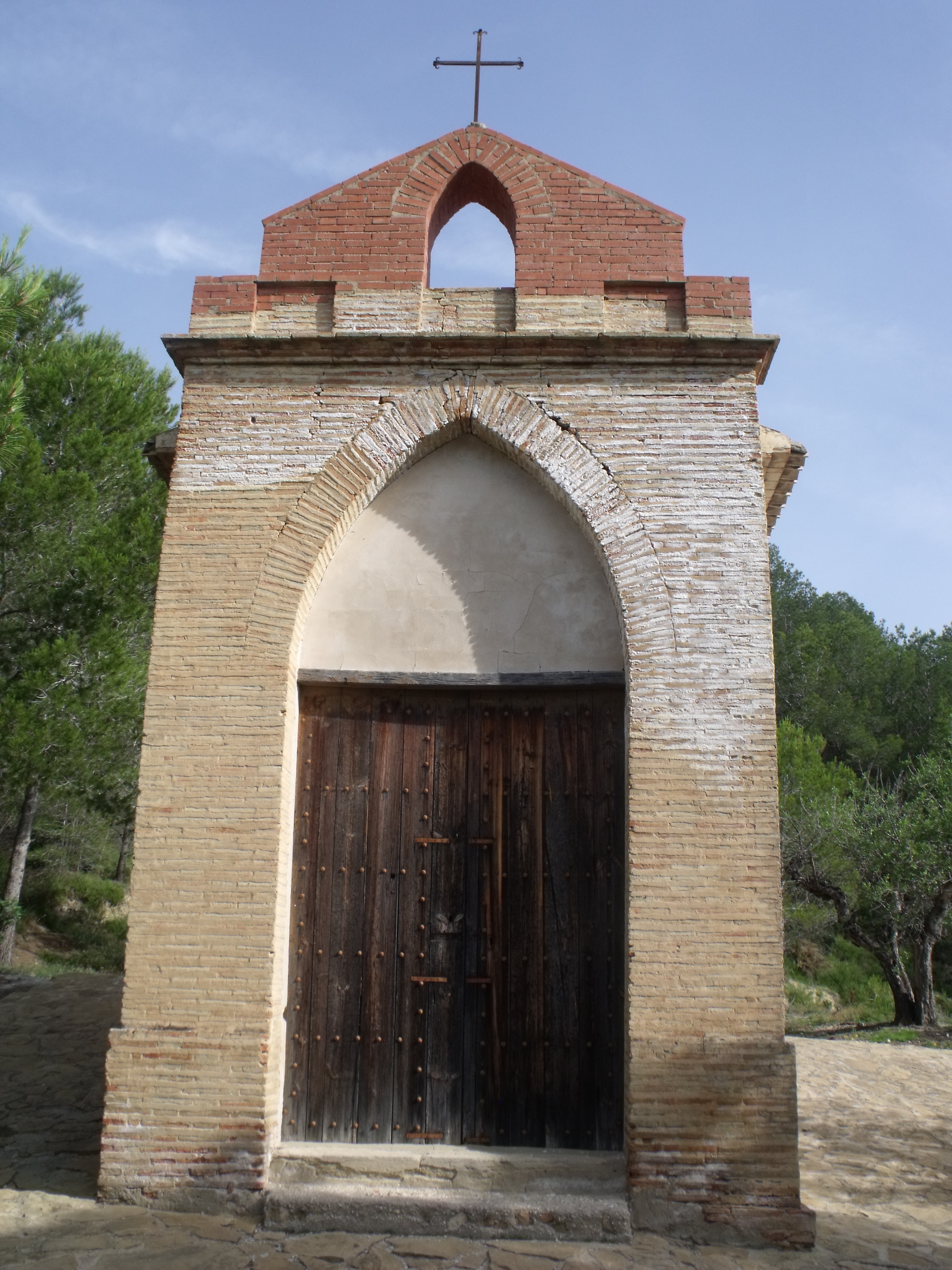 Montichelvo